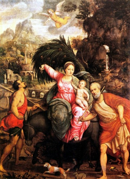 Pomponio Amalteo Fuga in Egitto Olio su tela Duomo Pordenone